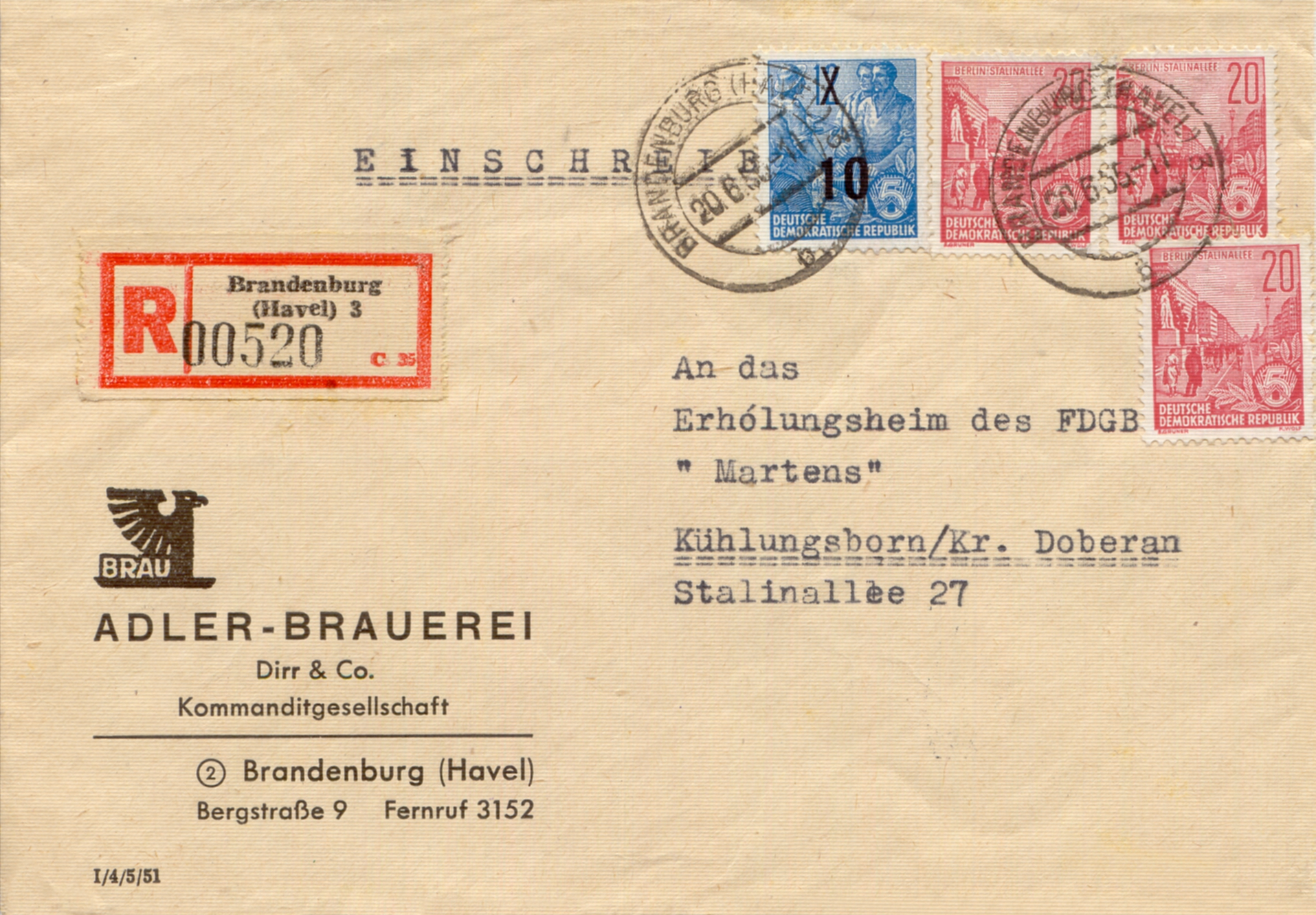 Mischfrankatur mit Werten aus der Dauerserie 5-Jahr-Plan, DDR 1955, Einschreiben